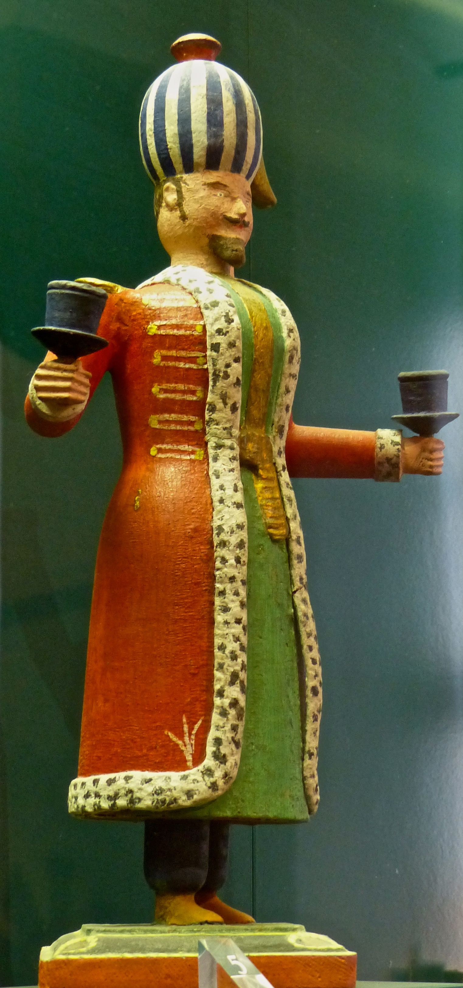 Lichttragener Türke, um 1850/60, gefertigt in Arnsfeld, Museum Scharfenstein